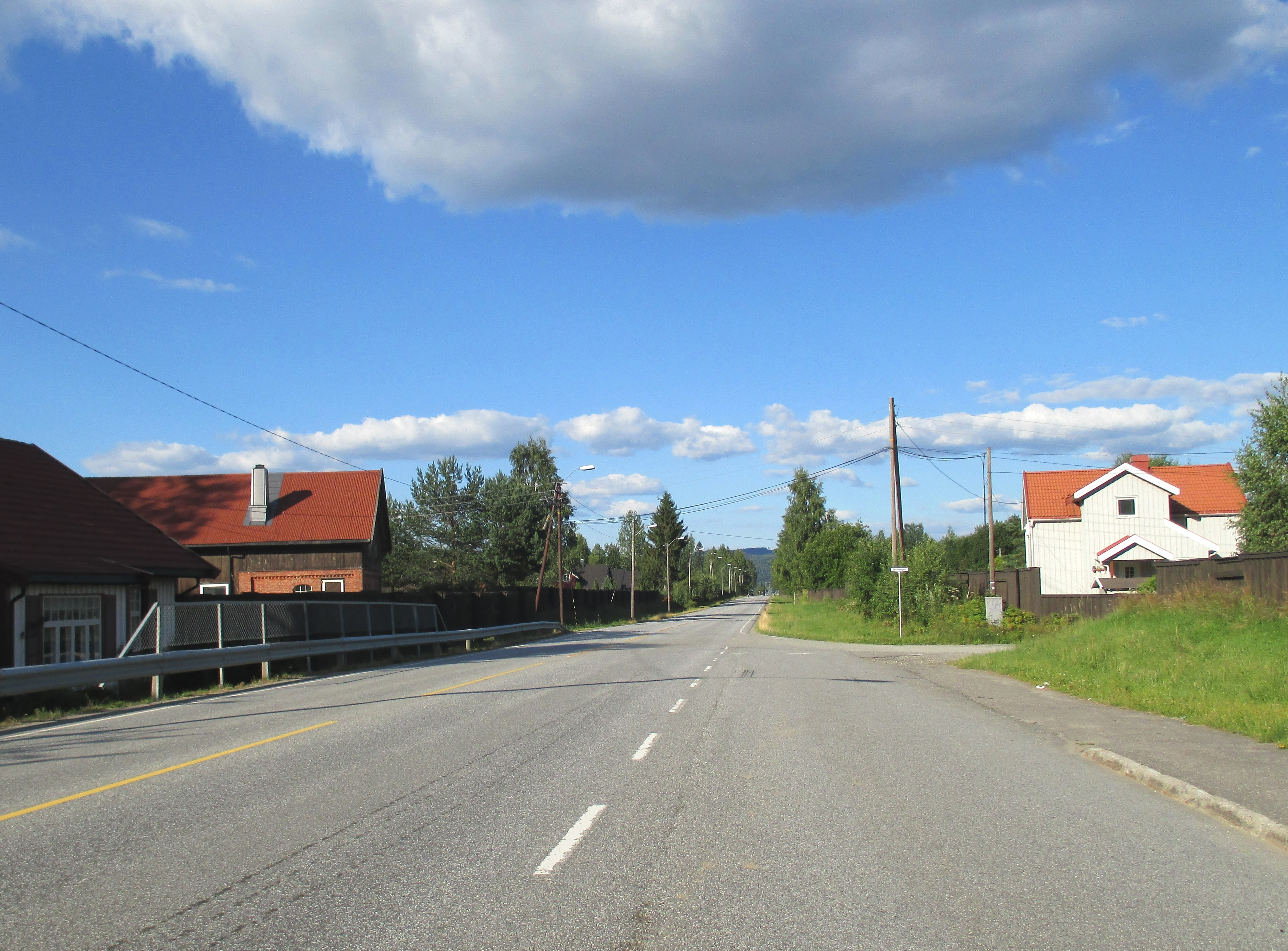 Fylkesvei 501 like vest for Minnesund